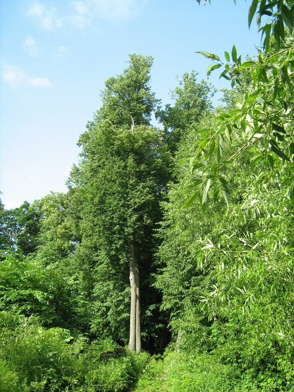 Вердамічы. Парк саўгаса «Вердамічы»